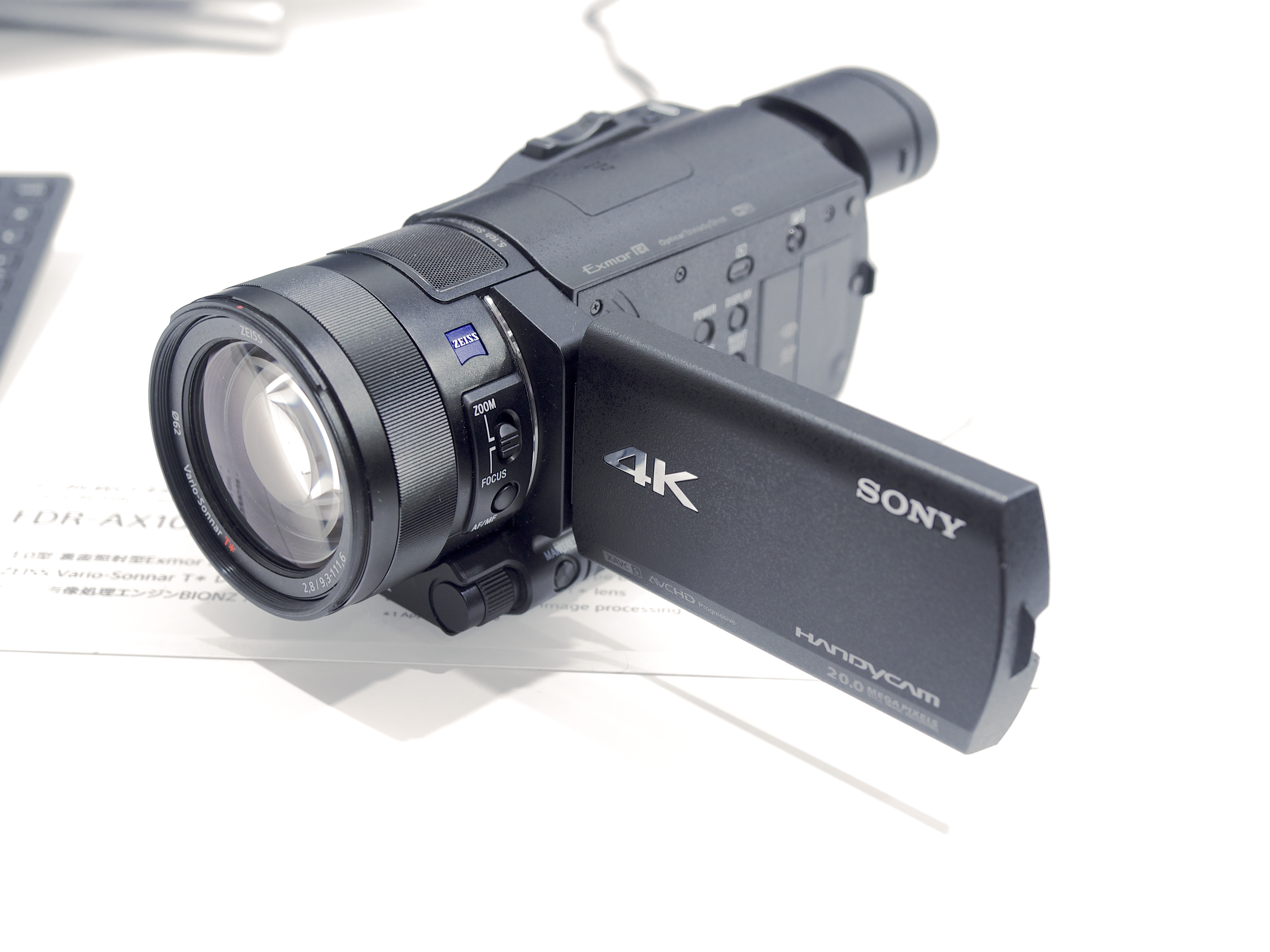 索尼Handycam FDR-AX100前端。